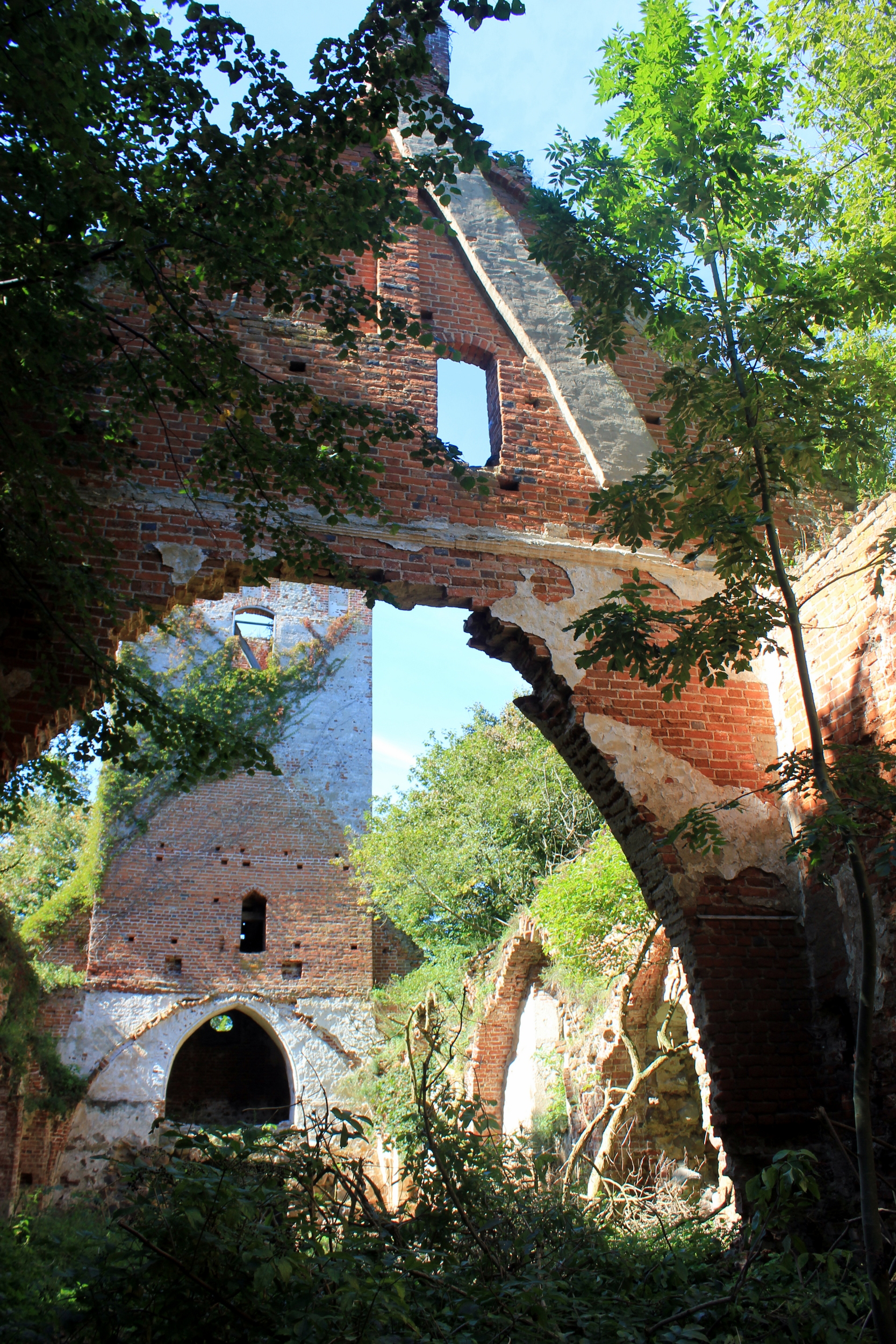 Ruine der Dorfkirche in Schaaken (heute Schemtschuschnoje, Oblast Kaliningrad).